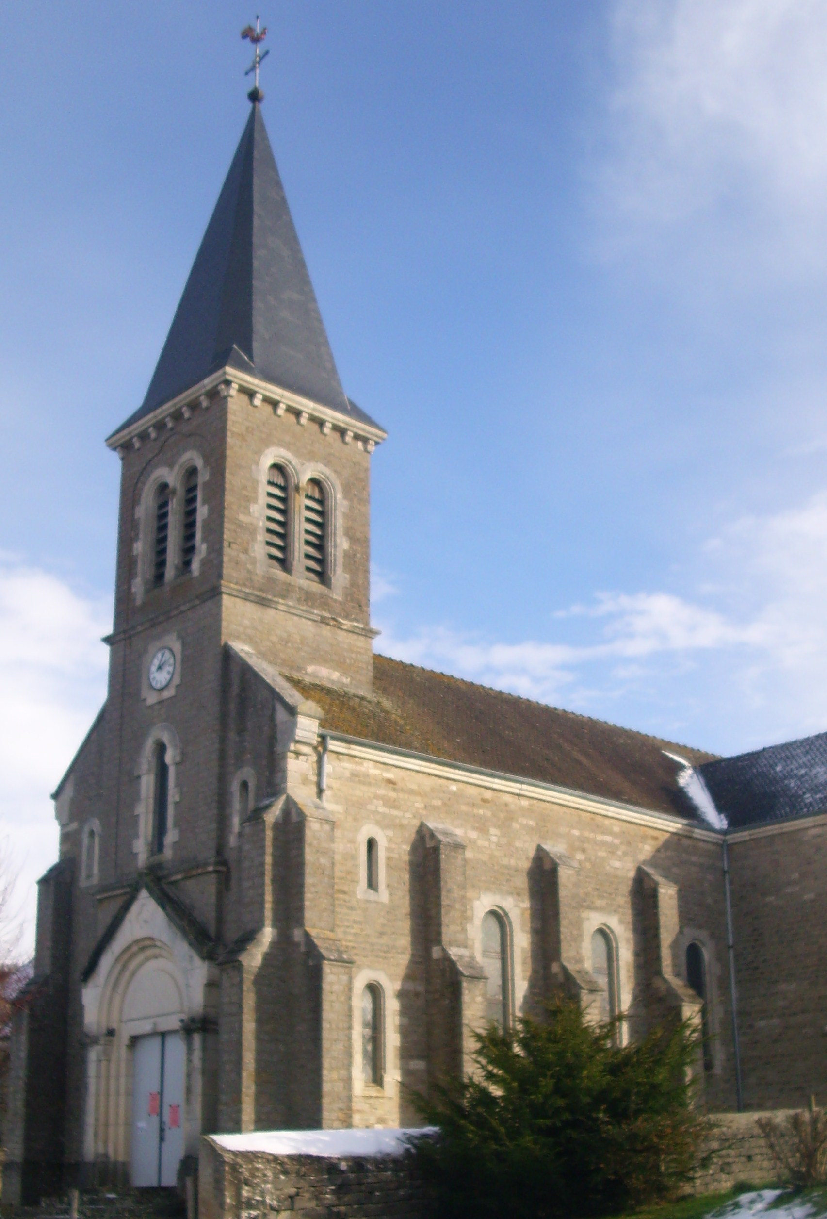 Eglise de Saint-Denis-de-Vaux (71)